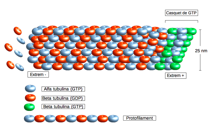 Imatge de creació pròpia on s'observa com les subunitats de tubulina alfa i beta, hidrolitzen GTP per formar un microtúbul